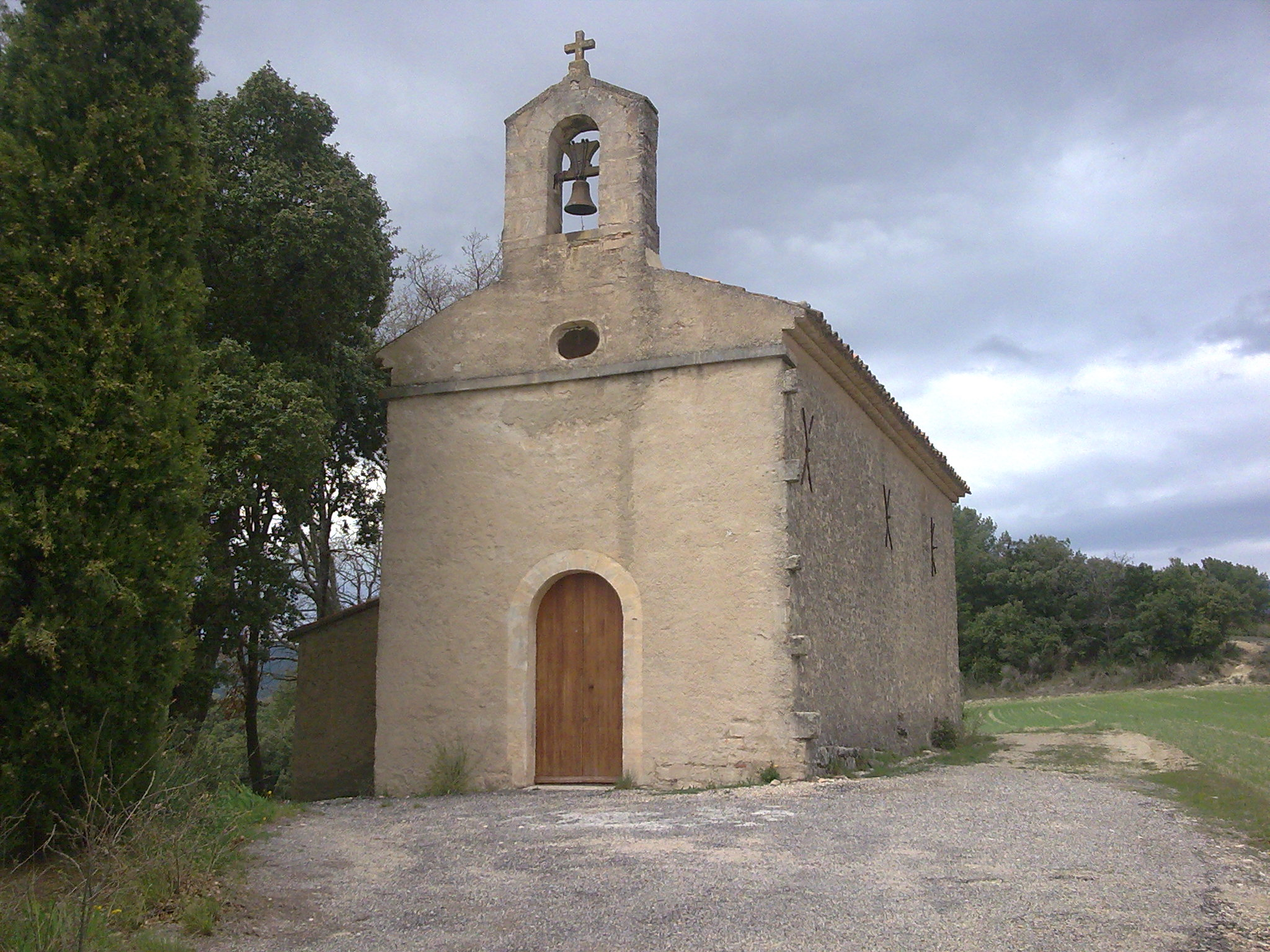 Chapelle de Sannes (Vaucluse)